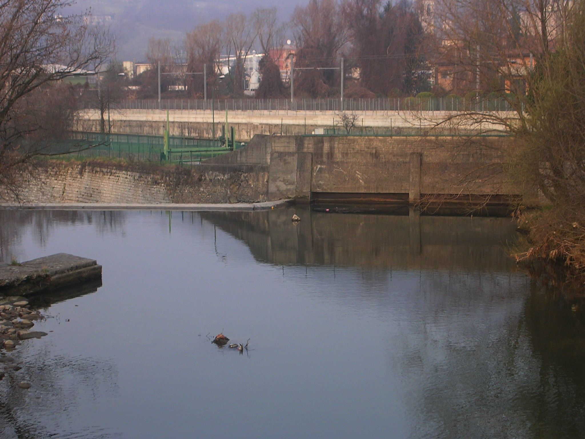 Fiume Serio e bocca di presa delle rogge Serio Grande, Morlana e Borgogna presso Albino (Bergamo)